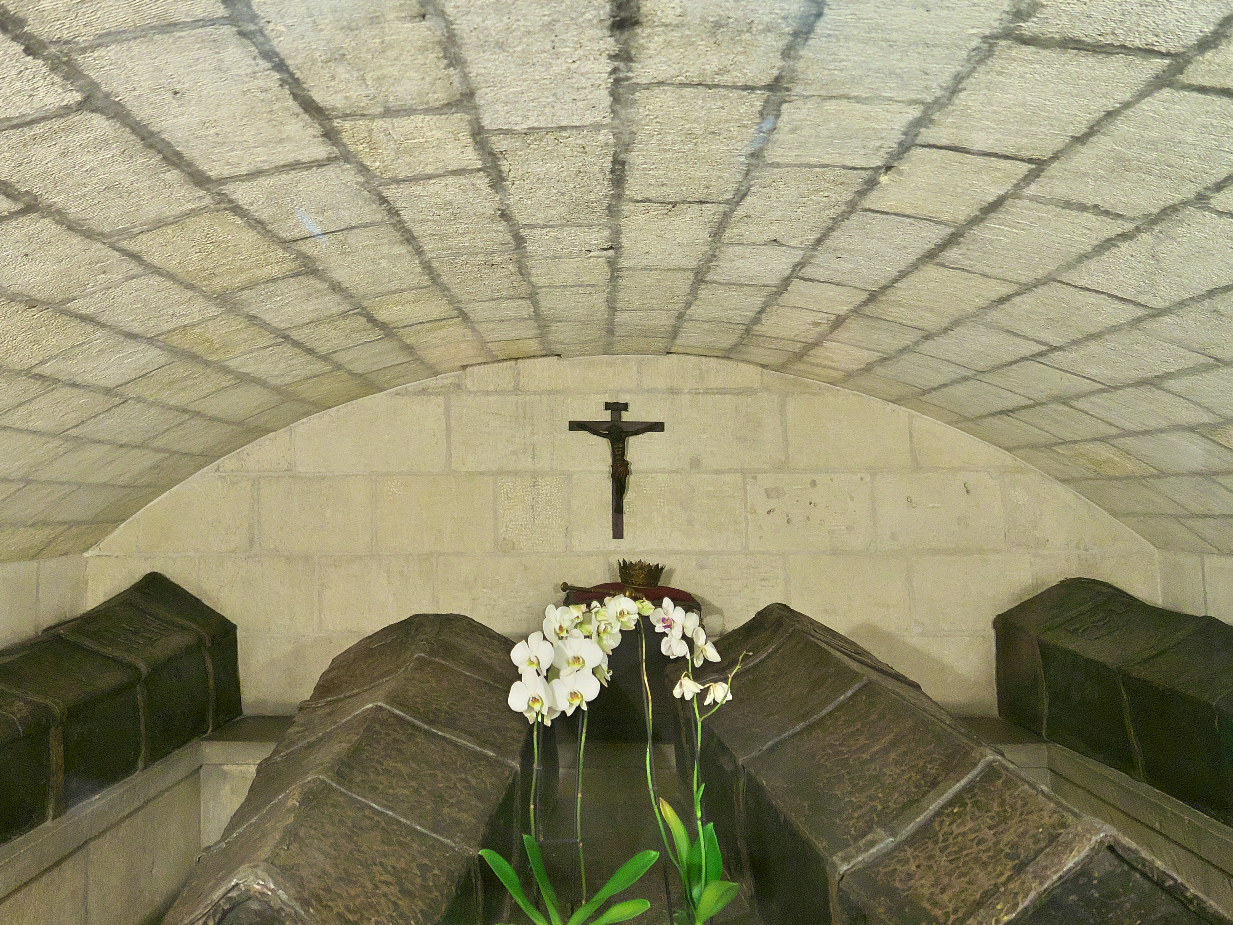 Cripta con los féretros de Isabel I de Castilla, Fernando II de Aragón, Juana I de Castilla y Felipe I de Castilla.